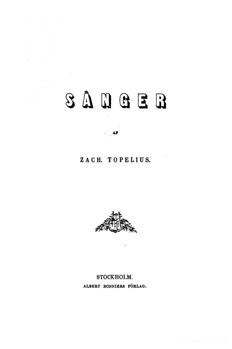 Zacharias Topelius "Sånger" i orginalutgåva 1860.